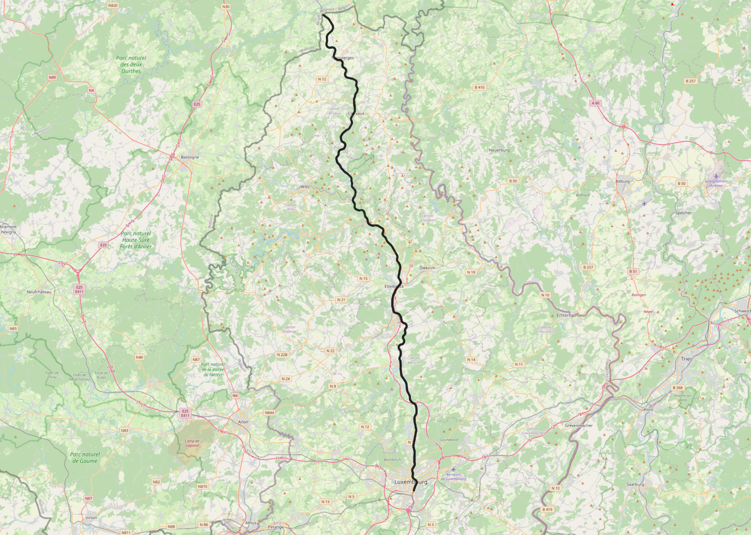 CFL line 1, Luxembourg - Troisvierges